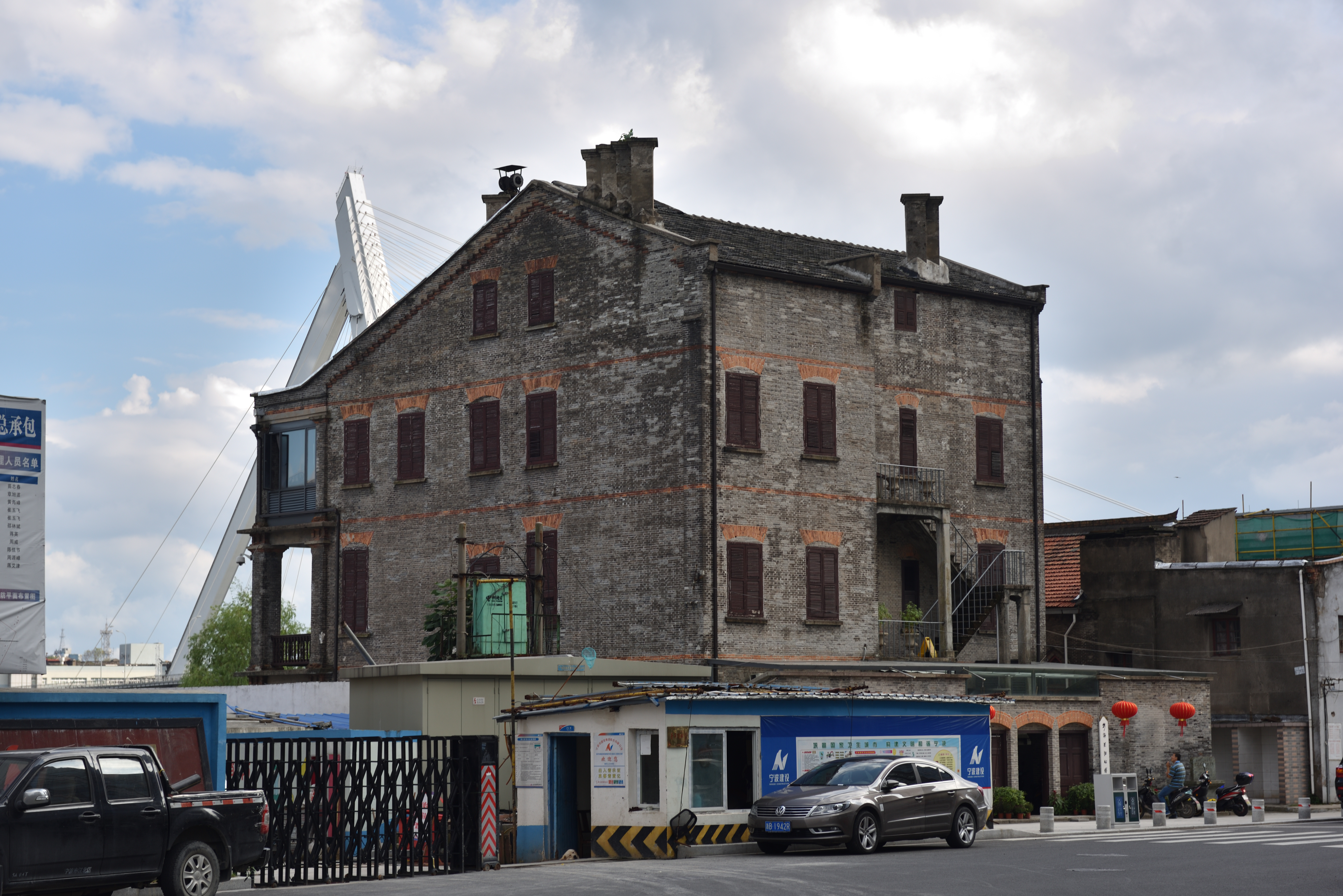 宁波浙海关旧址